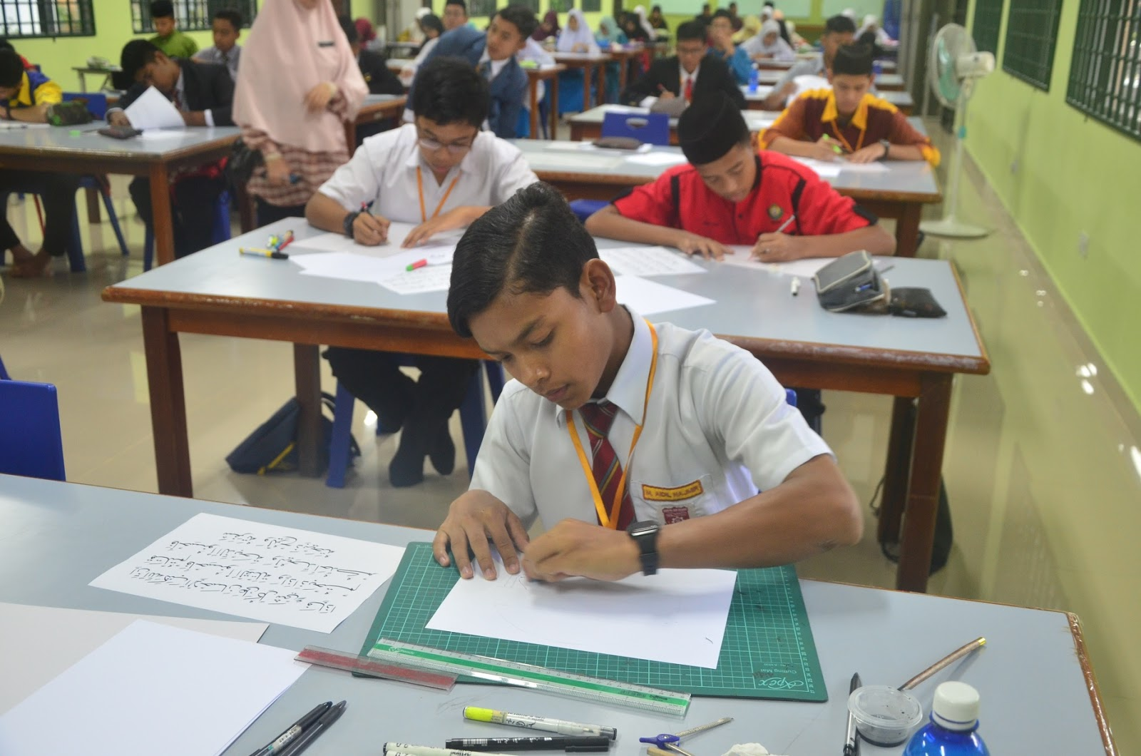 Salah seorang peserta pertandingan khat sedang menyiapkan karyanya di Bilik Seminar Fathurrahman bersempena dengan Festival Kesenian Islam (FKI) Sekolah Berasrama Penuh (SBP) Peringkat Kebangsaan 2017 pada 30 Oktober 2017.